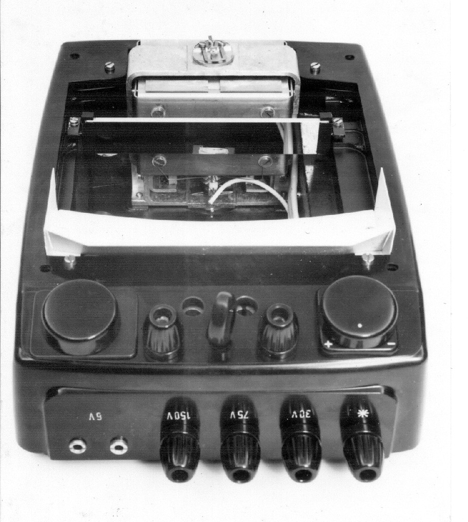 Feszítettszálas lengőtekercses műszer fénymutatóval. Jól látható az egyik tükör, mely a fénymutató "összehajtogatását" biztosítja.